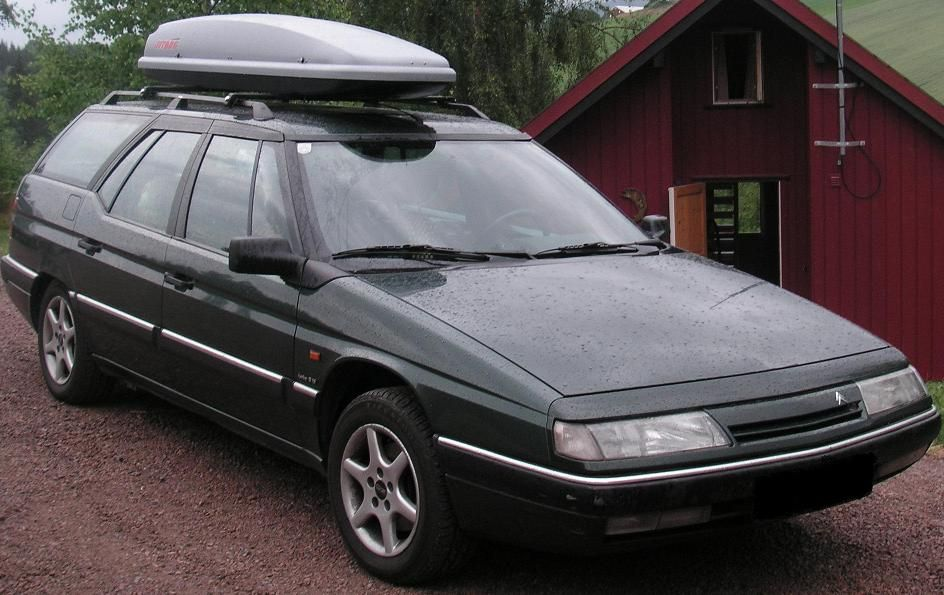 Citroen XM Break 2.1D, 1994